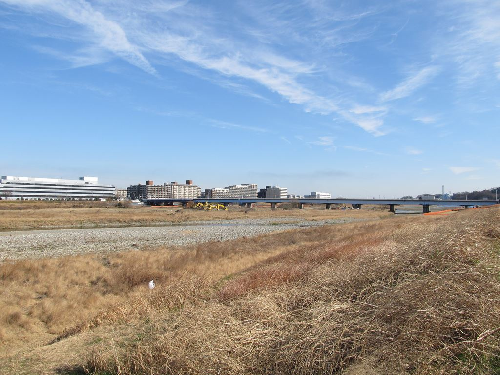 東京都道18号府中町田線。関戸橋。東京都府中市